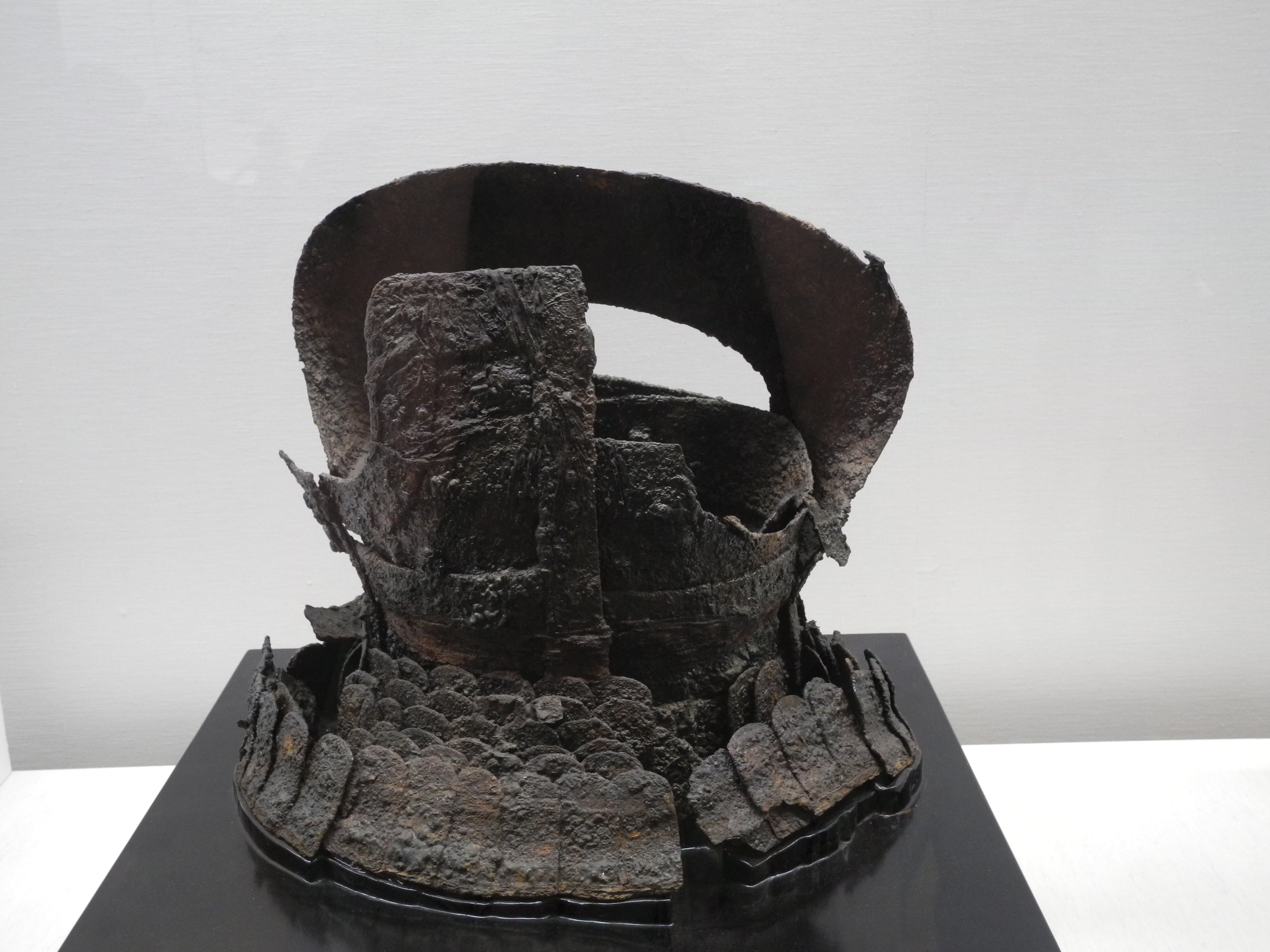 Танко с ламеллярной юбкой